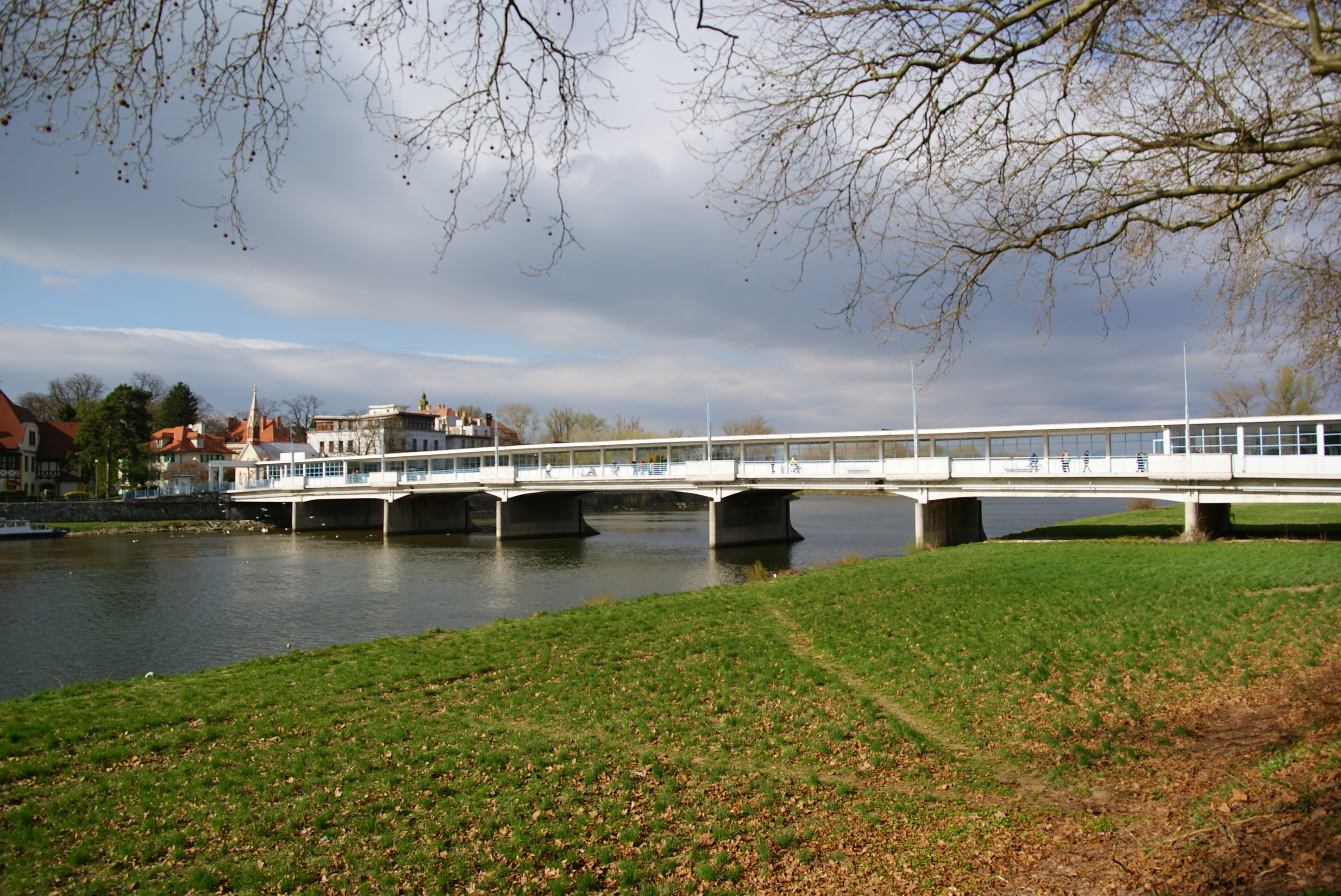 MOST KOLONÁDOVÝ